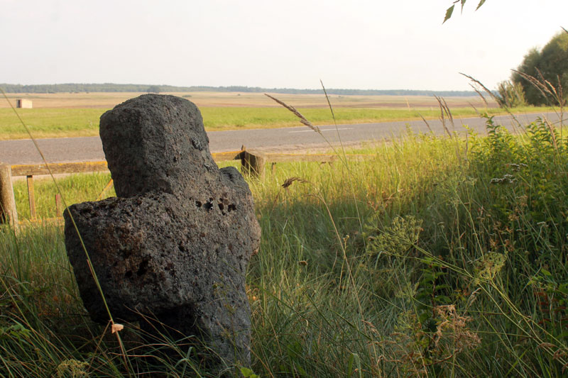 Кажары. Каменныя крыжы на могілках